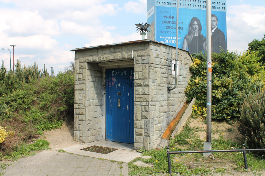 Zlokalizowane na Polu Mokotowskim wejście do Centralnej Dyspozytorni warszawskiego metra znajdującej się w latach 1993–2007 w pobliżu stacji metra A11 Politechnika.